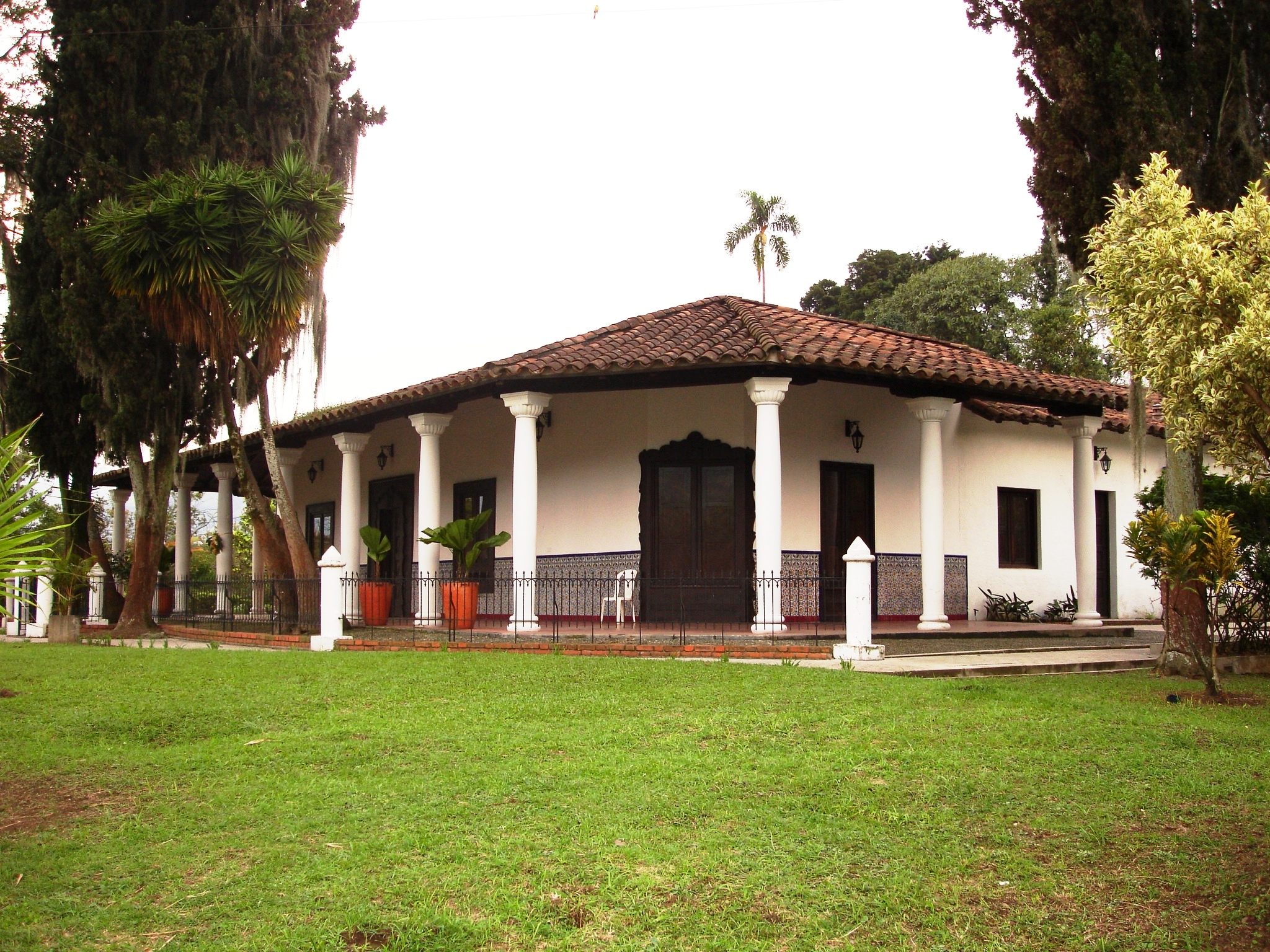 Aspecto lateral de la Casa de Convenciones Ditaires, en el municipio de Itagüí, Antioquia, Colombia